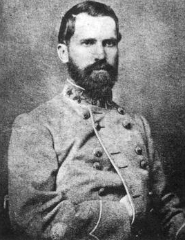 Brigadier General Abner Monroe Perrin